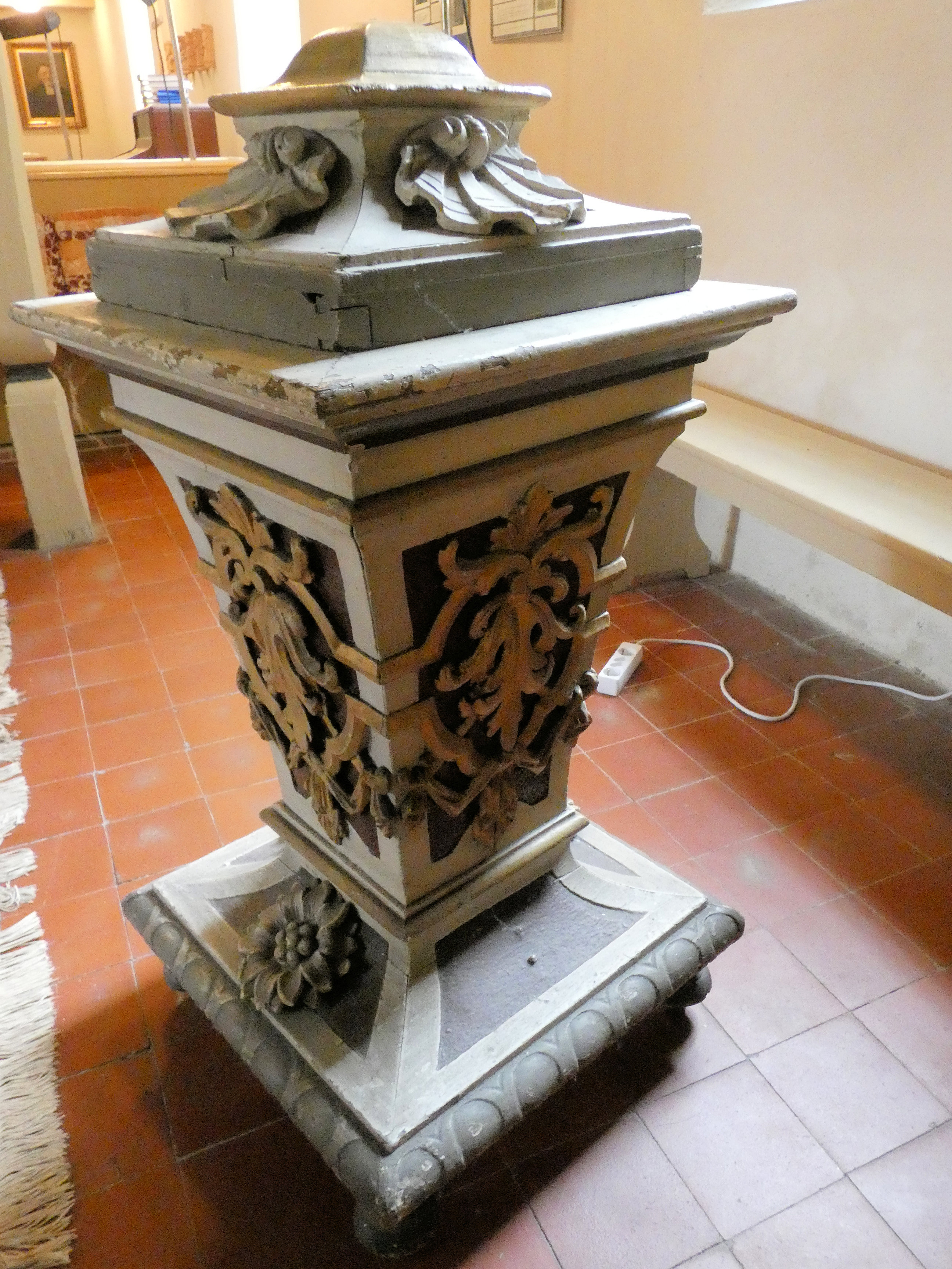 Hözernes Taufbecken von 1739, St. Katharinen Ammendorf, Halle (Saale)